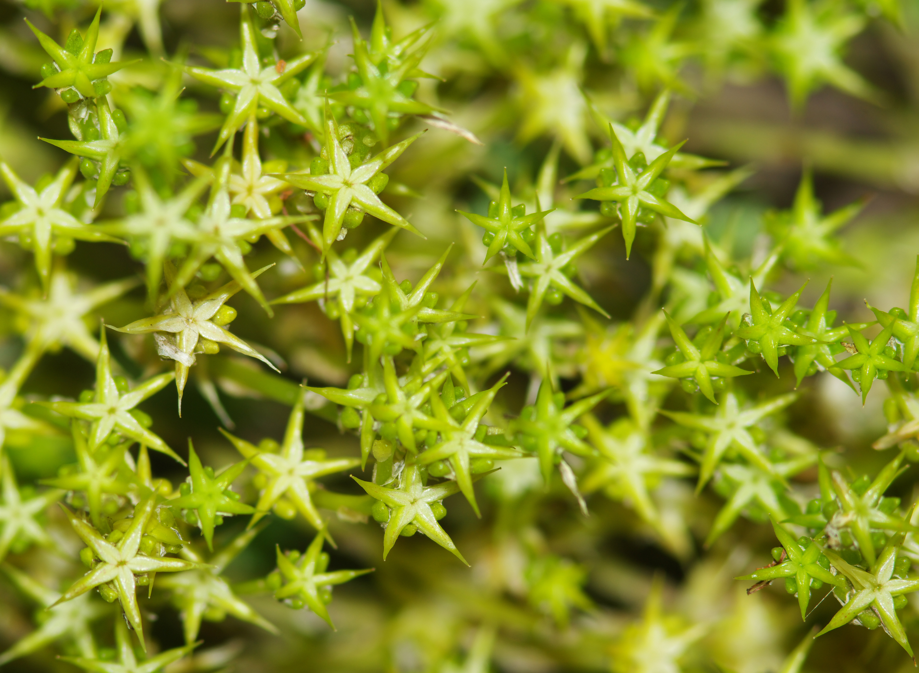 Rozchodnik ostry (Sedum acre) - owoce